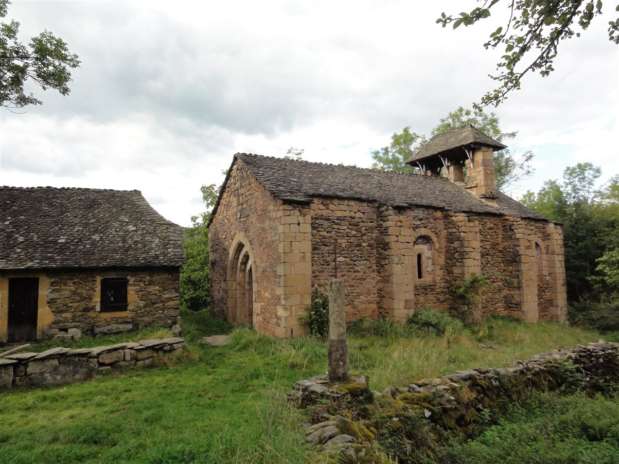 Église Saint-Pierre